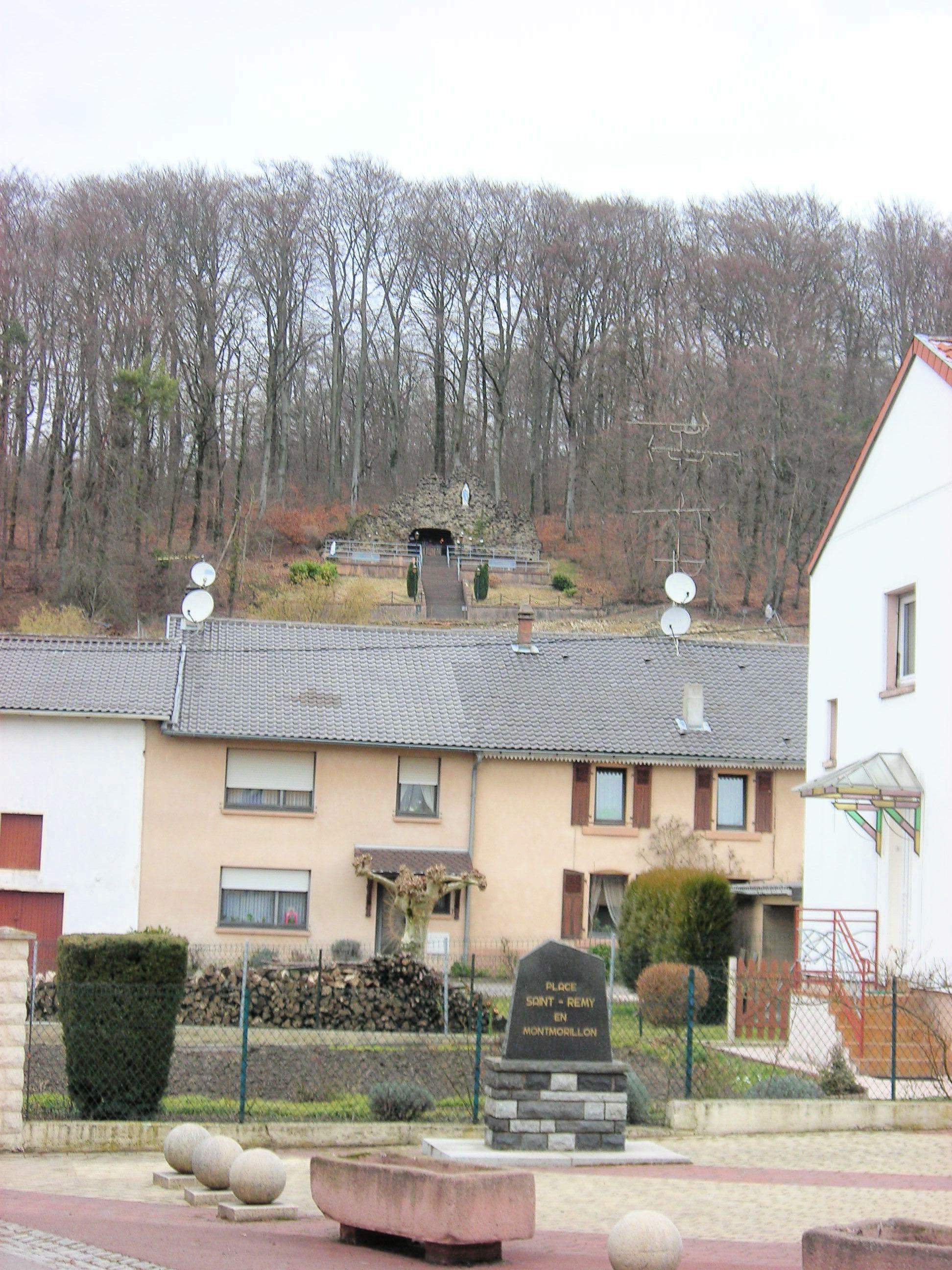 Grotte de Lourdes à Berviller-en-Moselle (57 France).